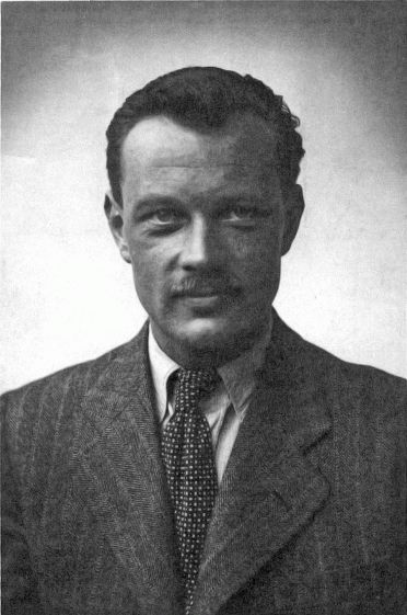 Jiří Potůček, (krycím jménem Tolar) (* 12. července 1919 Bruneck, dnes Itálie – 2. července 1942 les mezi vesnicemi Trnová a Rosice nad Labem) byl příslušník československé zahraniční armády v Anglii a radista výsadku Silver A.